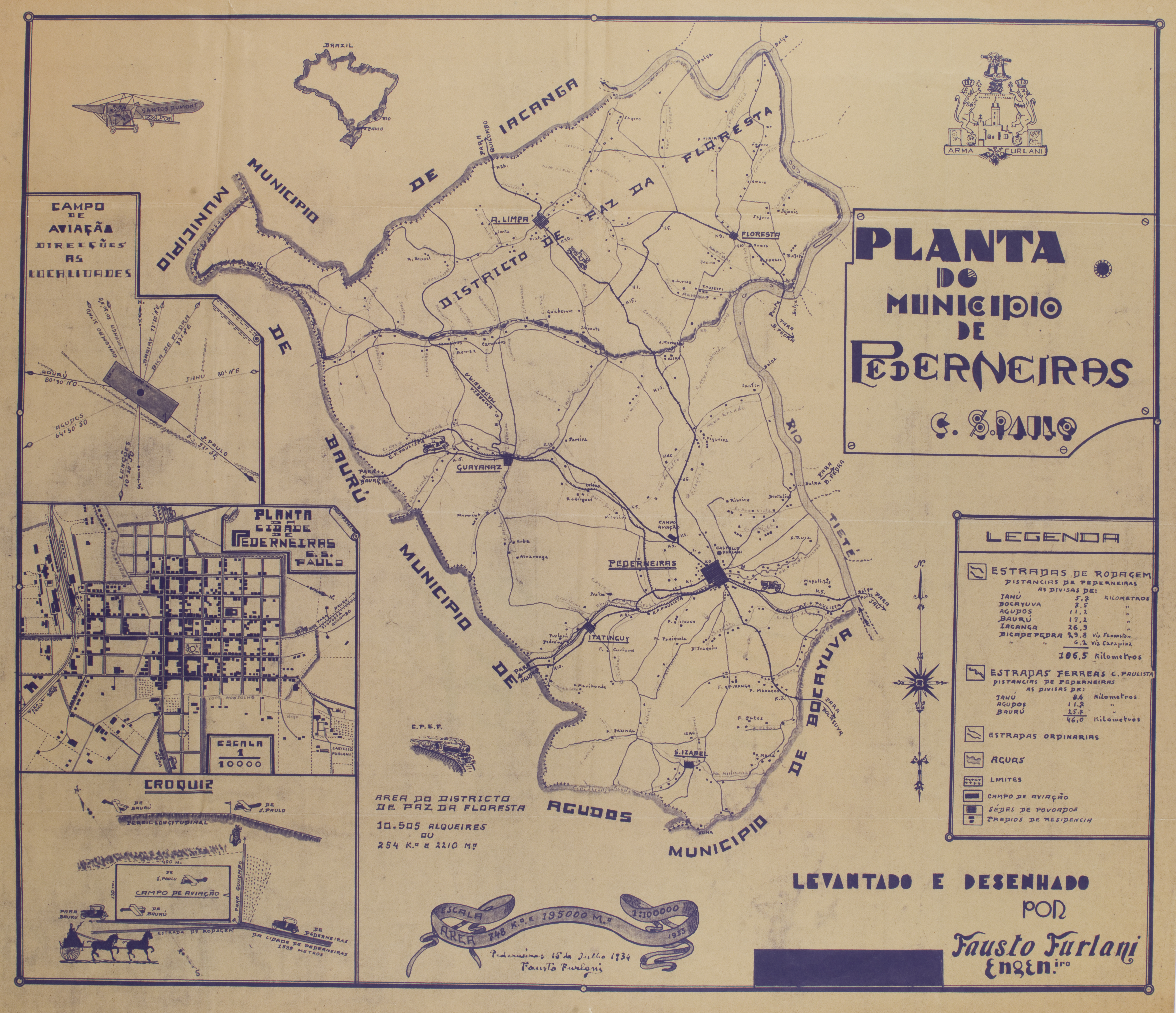 Obra que integra o acervo do Museu Paulista da USP. Coleção João Baptista de Campos Aguirra